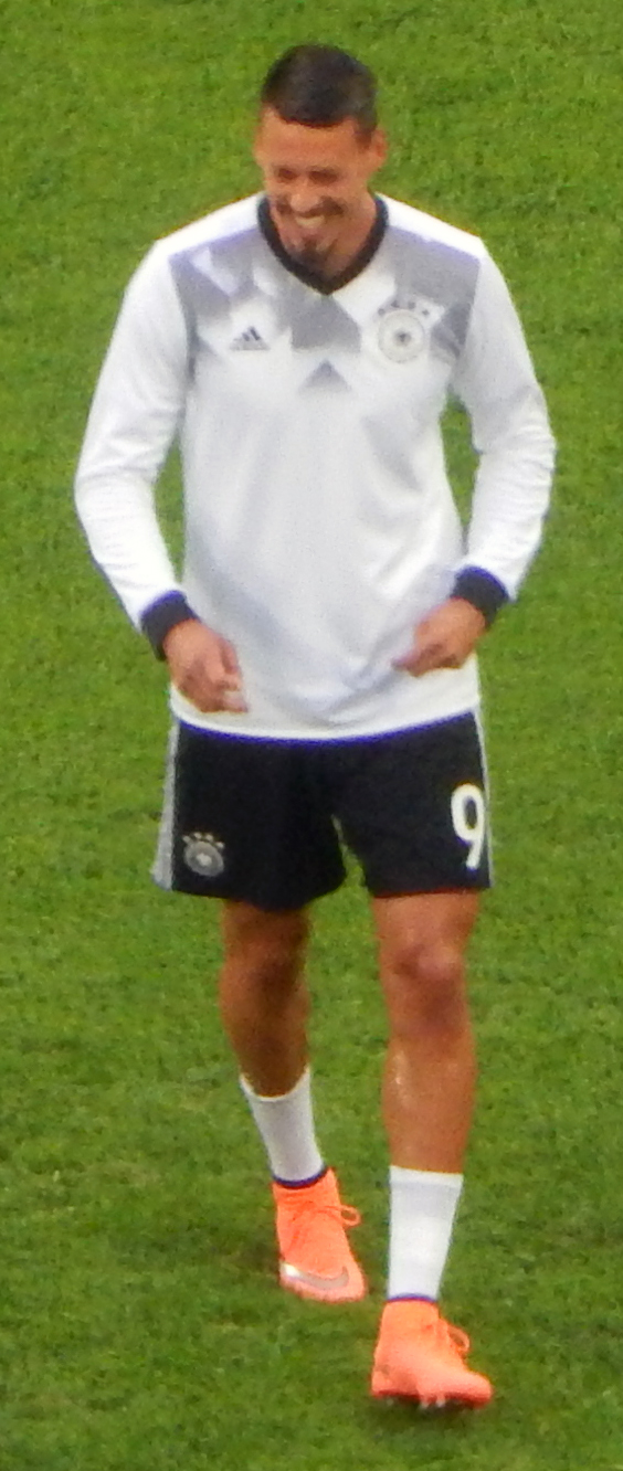 Финал Кубка конфедераций 2017